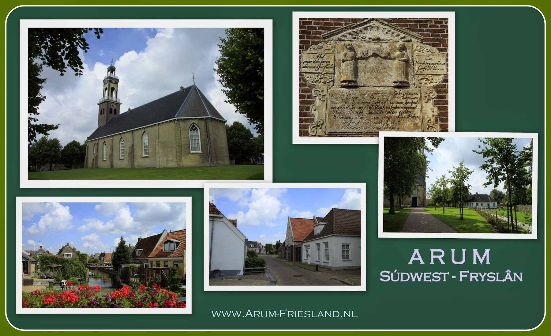 In de gemeente Sudwest-Fryslân in de provincie Fryslân, ligt het mooie dorp Arum in de Lytse Bouwhoeke (Kleine Bouwhoek)